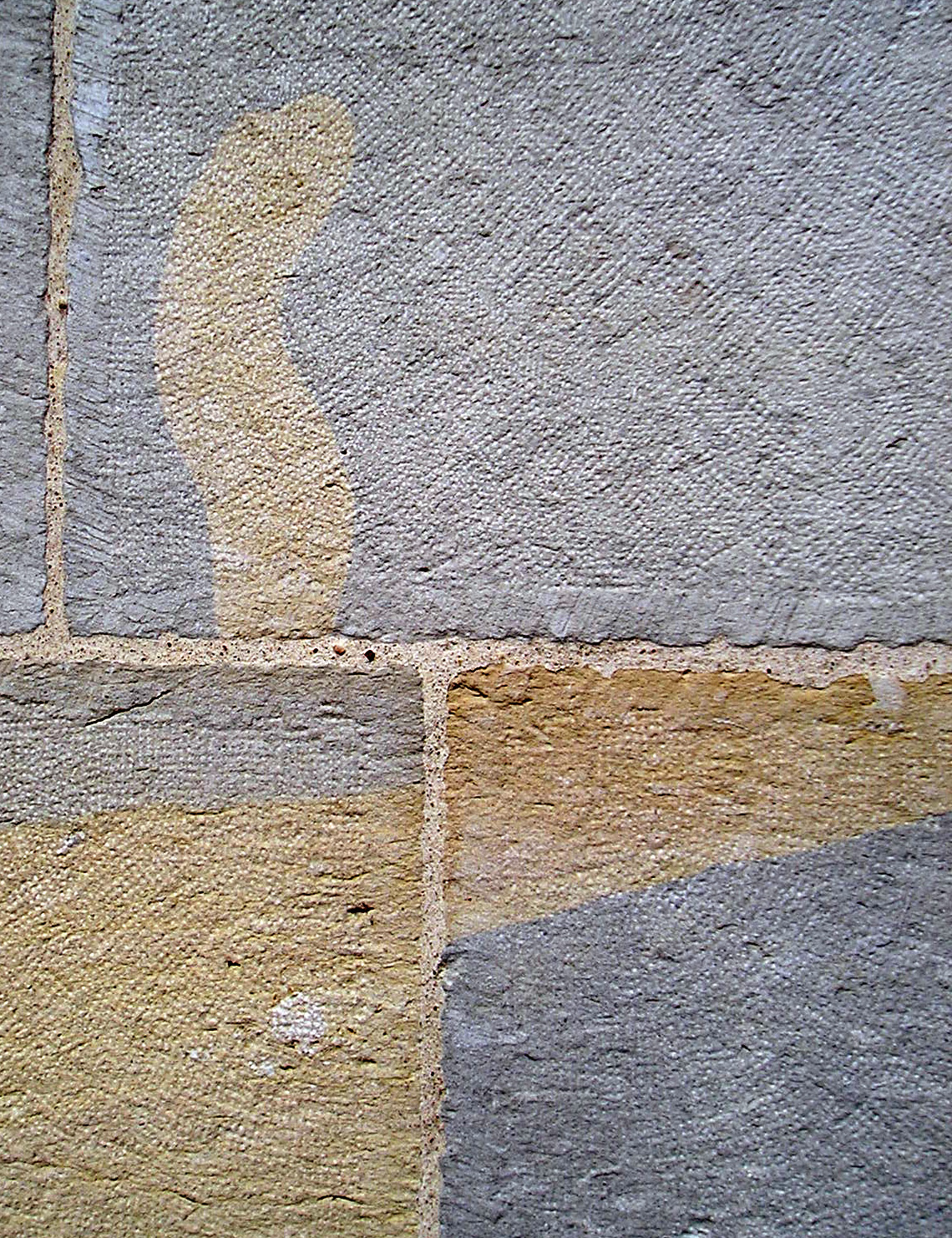 pierre calcaire dite "de Chailluz", de couleur ocre et gris/bleu et dont est construite la majeure partie des édifices du centre ancien de Besançon. Détail de l'église Saint-Maurice.